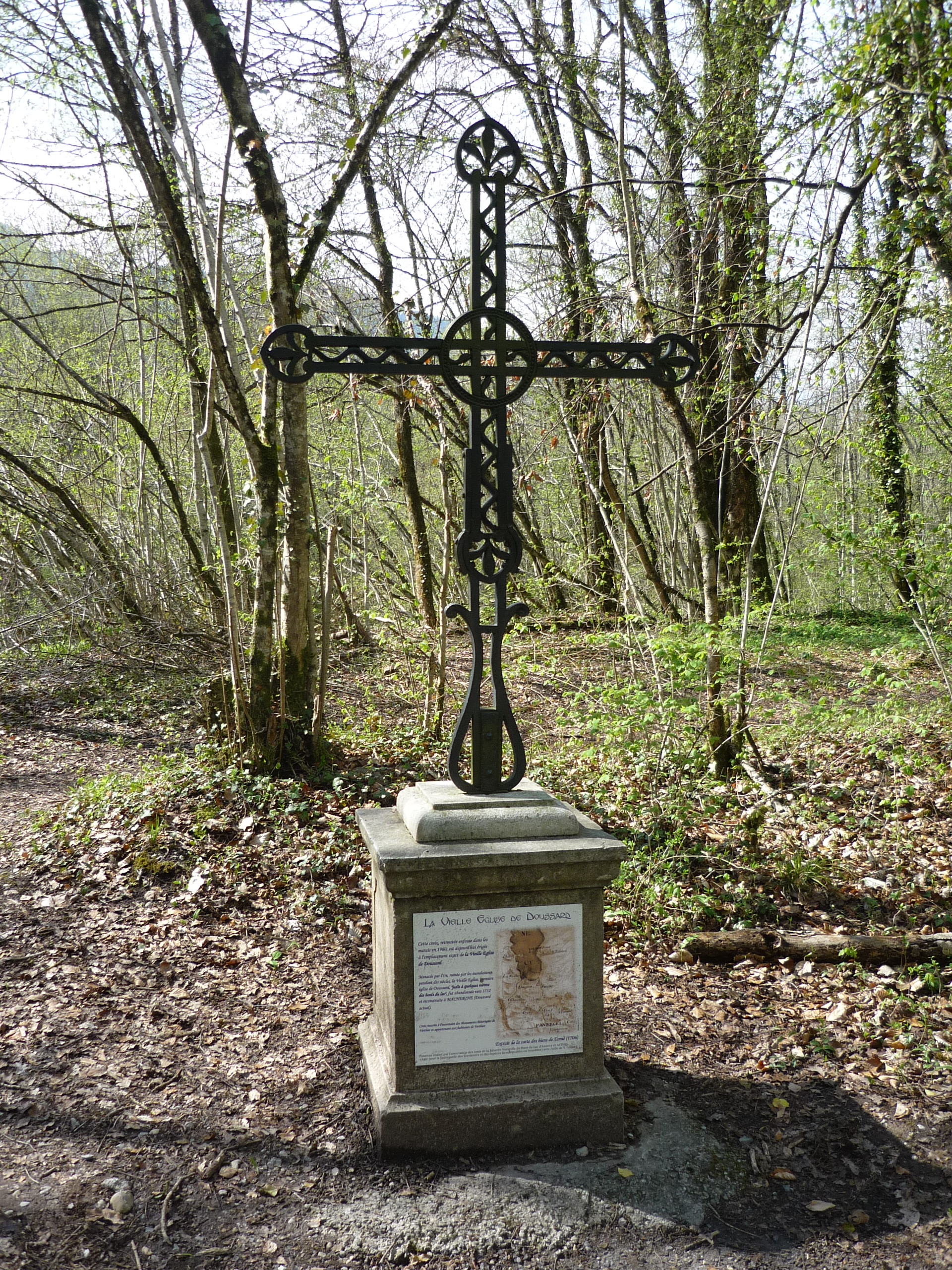 Croix de la vieille église de Doussard, réserve naturelle du Bout-du-Lac, Doussard, Haute-Savoie, France